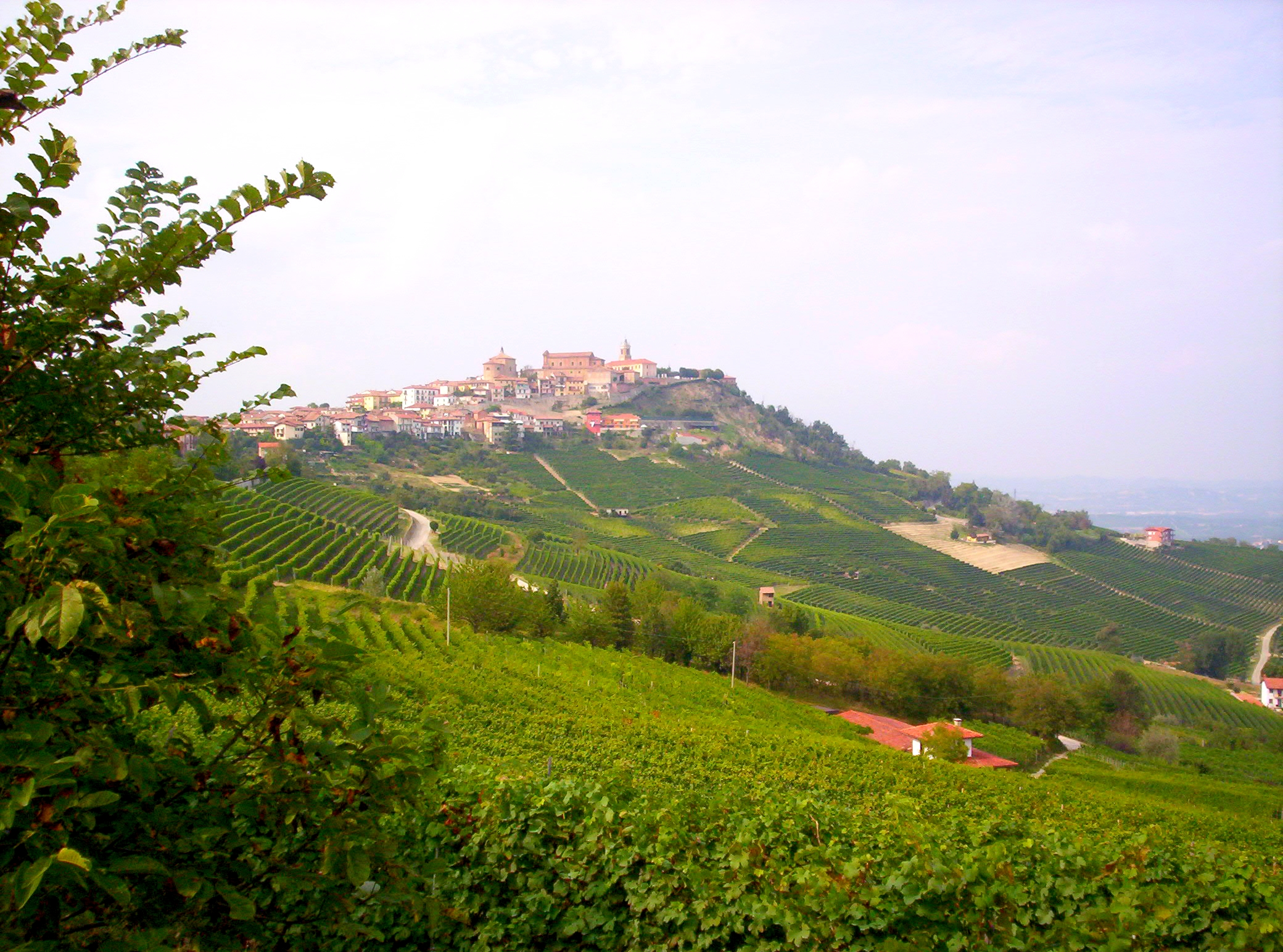 vista su La Morra (Cuneo)